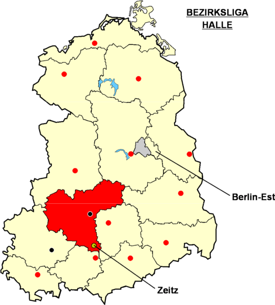 Localisation de Zeitz dans la "Bezirksliga Halle" à l'époque de la RDA Catégorie:Logo de clubs de football - Allemagne